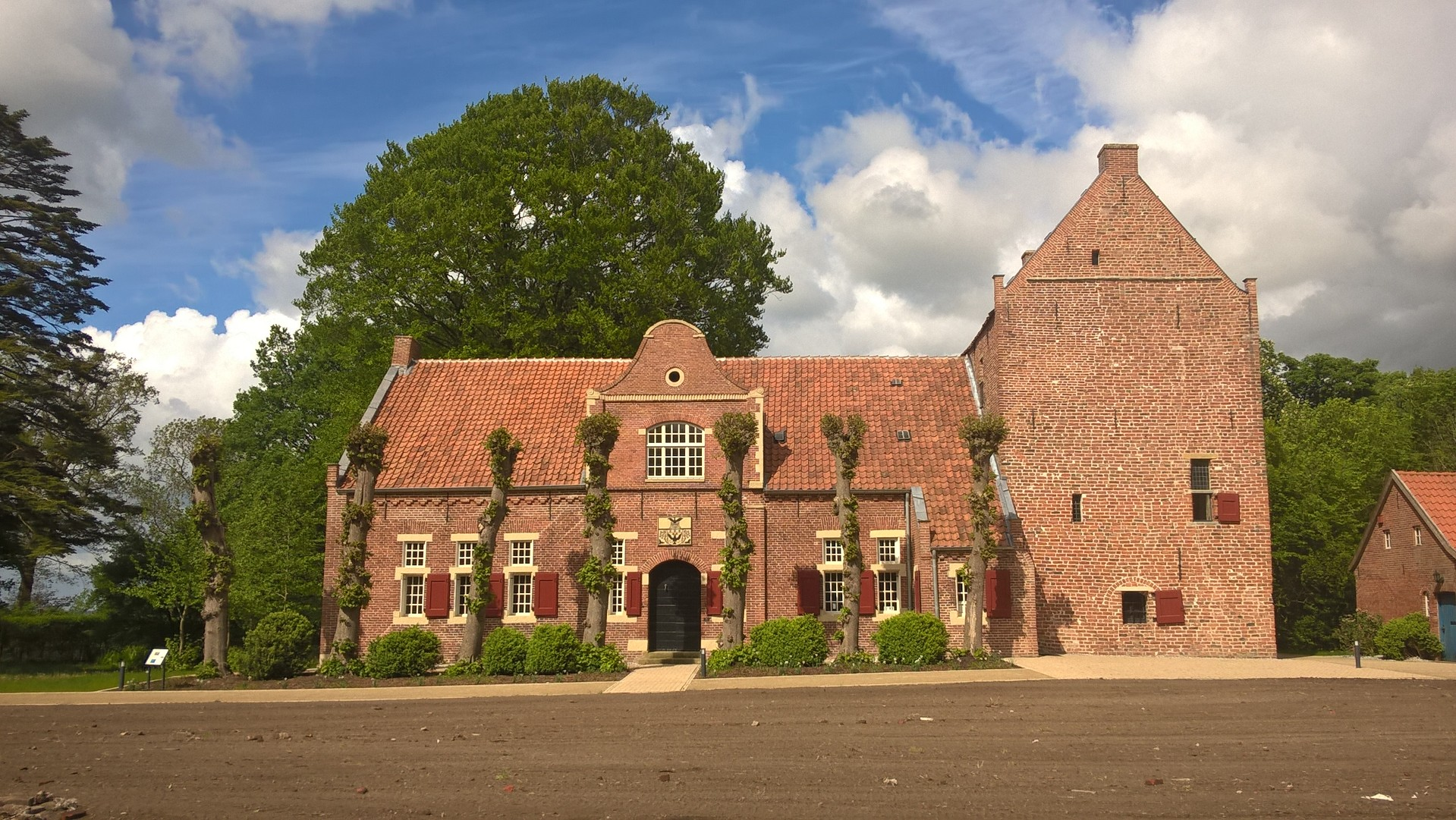 Steinhaus Bunderhee, Landkreis Leer, Ostfriesland, Deutschland